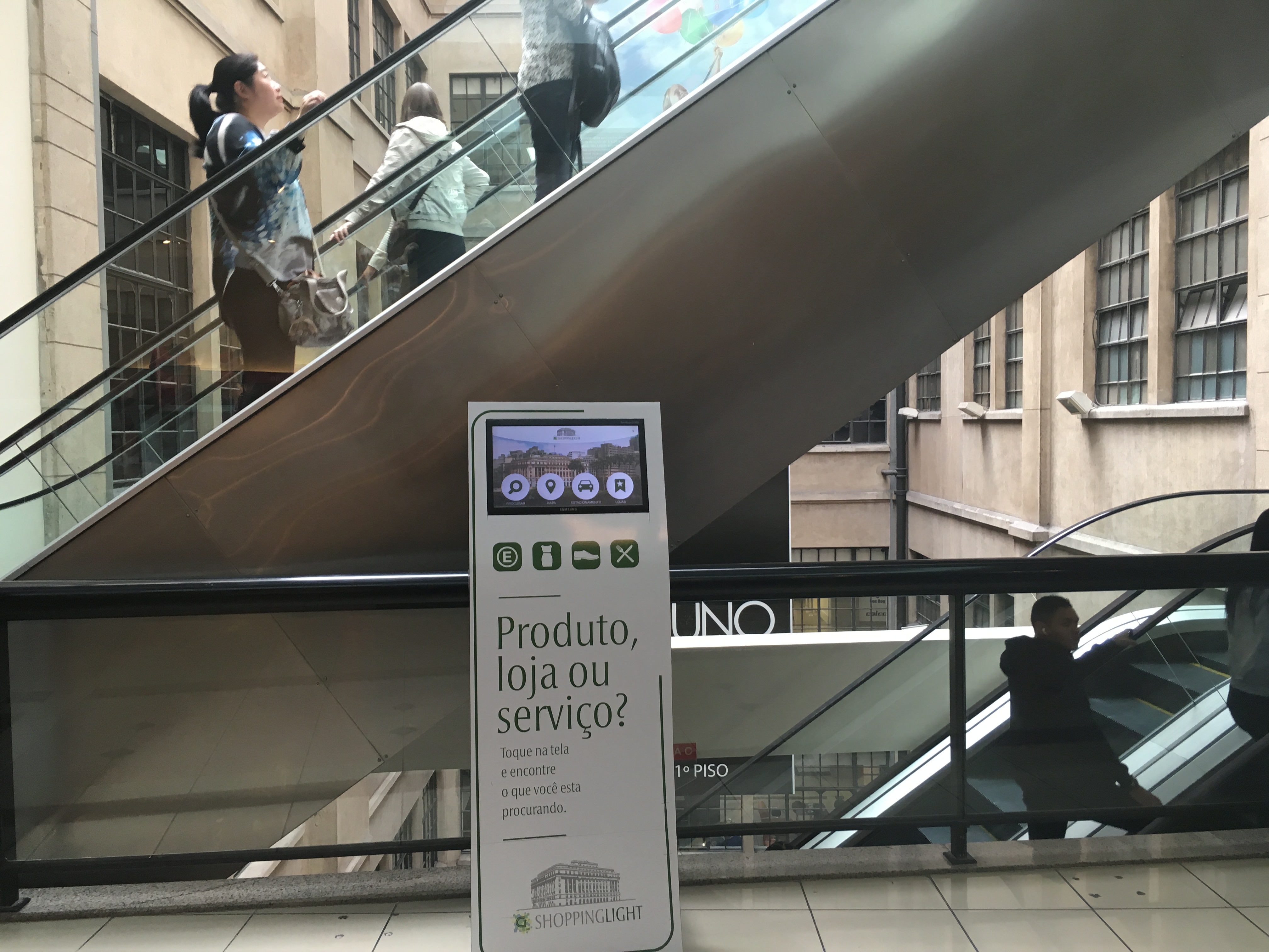 Cavalete de informações do Shopping Light, terceiro piso, localizado no Edifício Alexandre Mackenzie, São Paulo (SP).